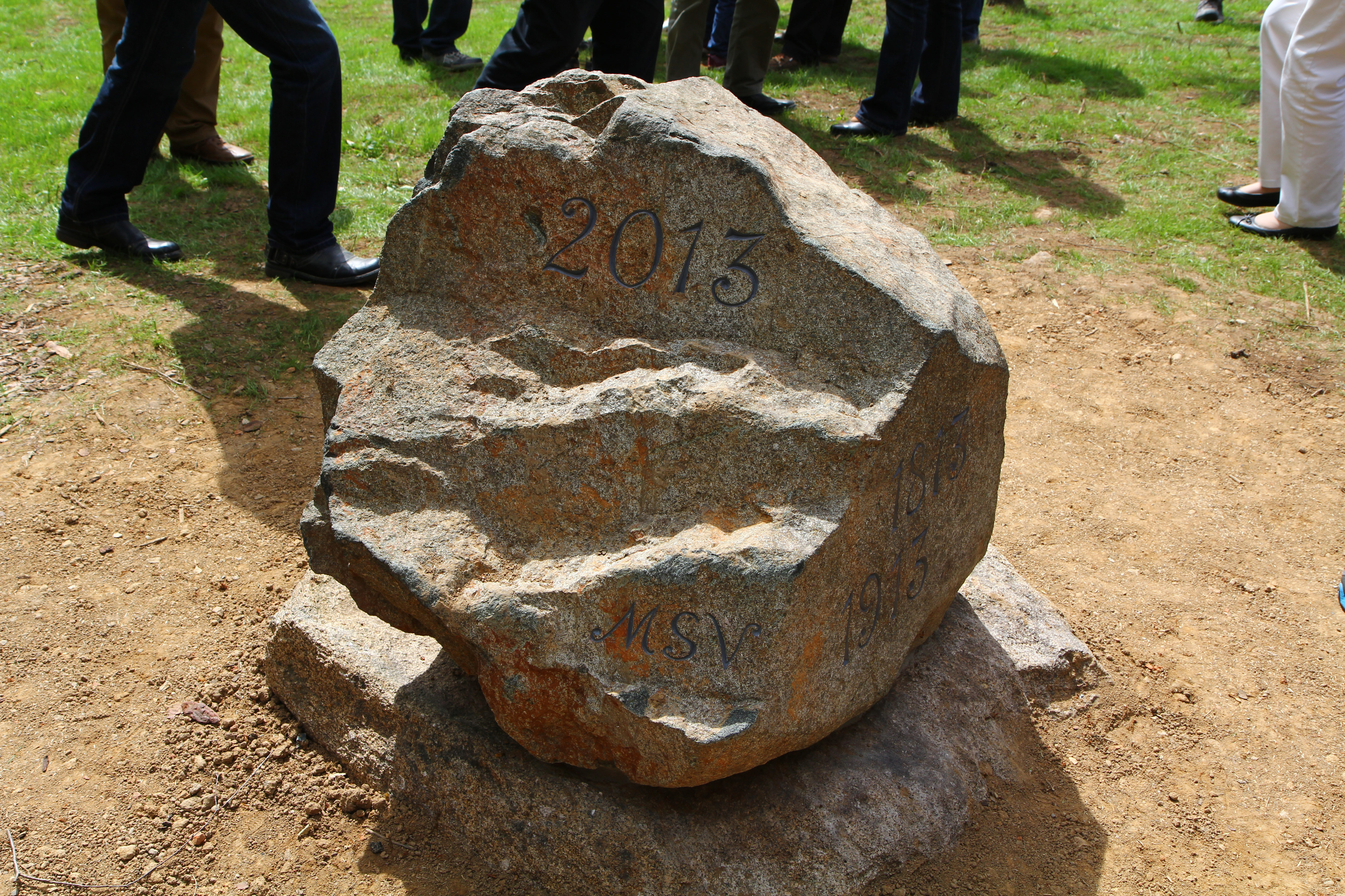 Gedenkstein anlässlich der 200. Jahrestages der Schlacht bei Bautzen